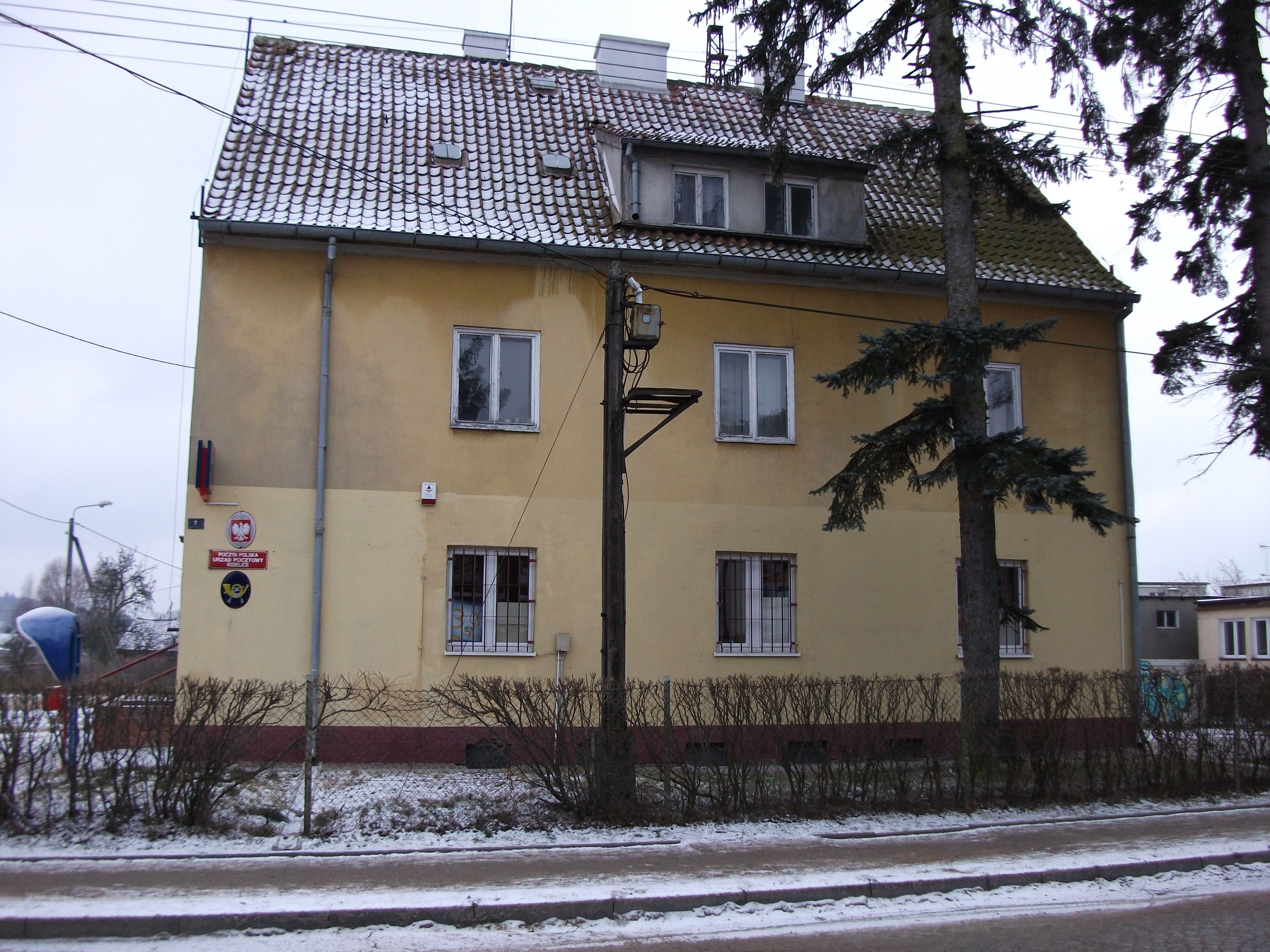 Poczta w Kisielicach